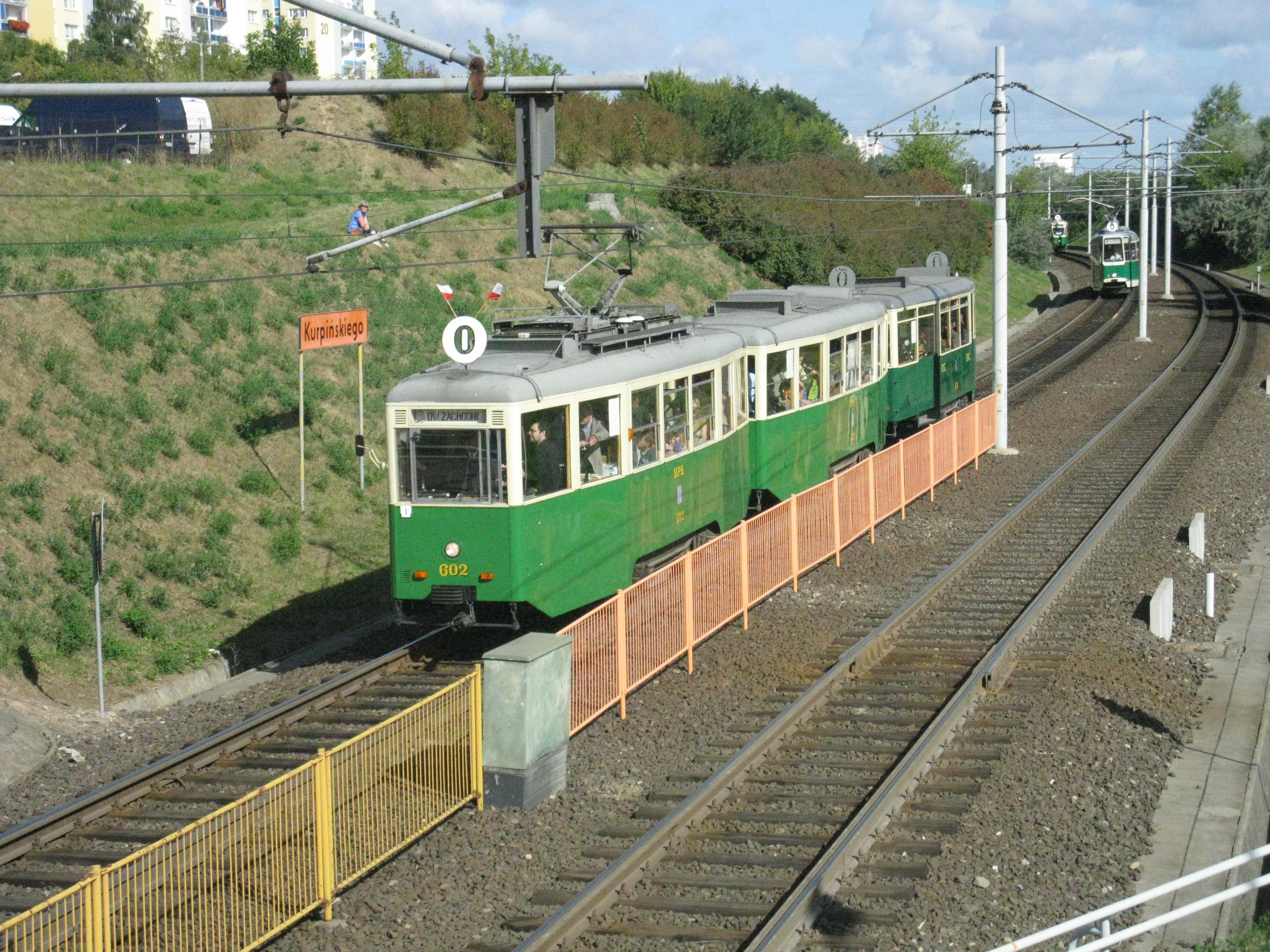 Parada tramwajów z okazji otwarcia przedłużonej trasy PST do dworca zachodniego